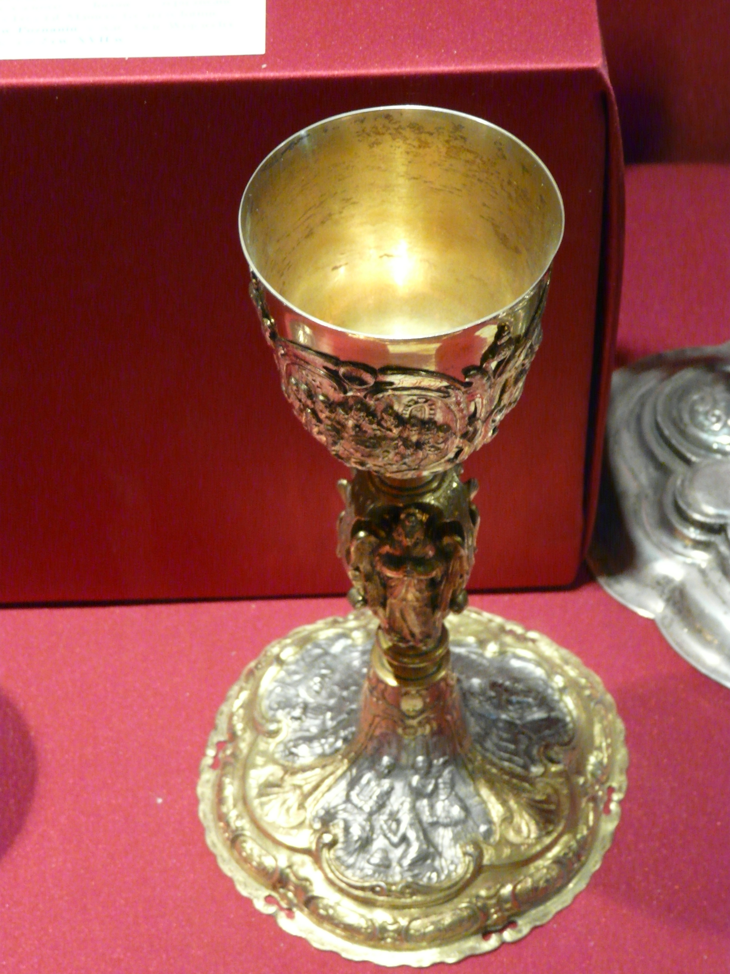 Museum of Archdiocese in Gniezno Kielich biskupa Grodeckiego. Srebro, częsciowo złocone, odlewane, cyzelowane. Wykonany w Poznaniu przez Stanisława Schwartza ok. 1650 r. Przekazany katedrze przez egzekutorów testamentu biskupa Adriana Grodeckiego, sufragana gnieźnieńskiego (um. w 1658). Na stopie przedstawione sceny z dzieciństwa Pana Jezusa powiązane z W... Na czaszy sceny... związane z Odkupieniem.